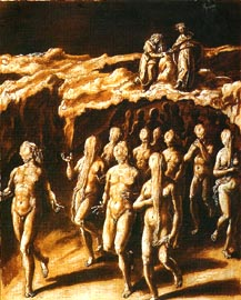 Divina Commedia, Inferno, Canto 20